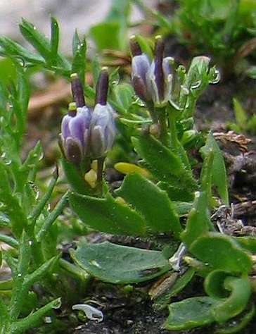 Arabis caerulea (Blau-Gänsekresse), photographed at Steirische Kalkspitze, Styria, Austria